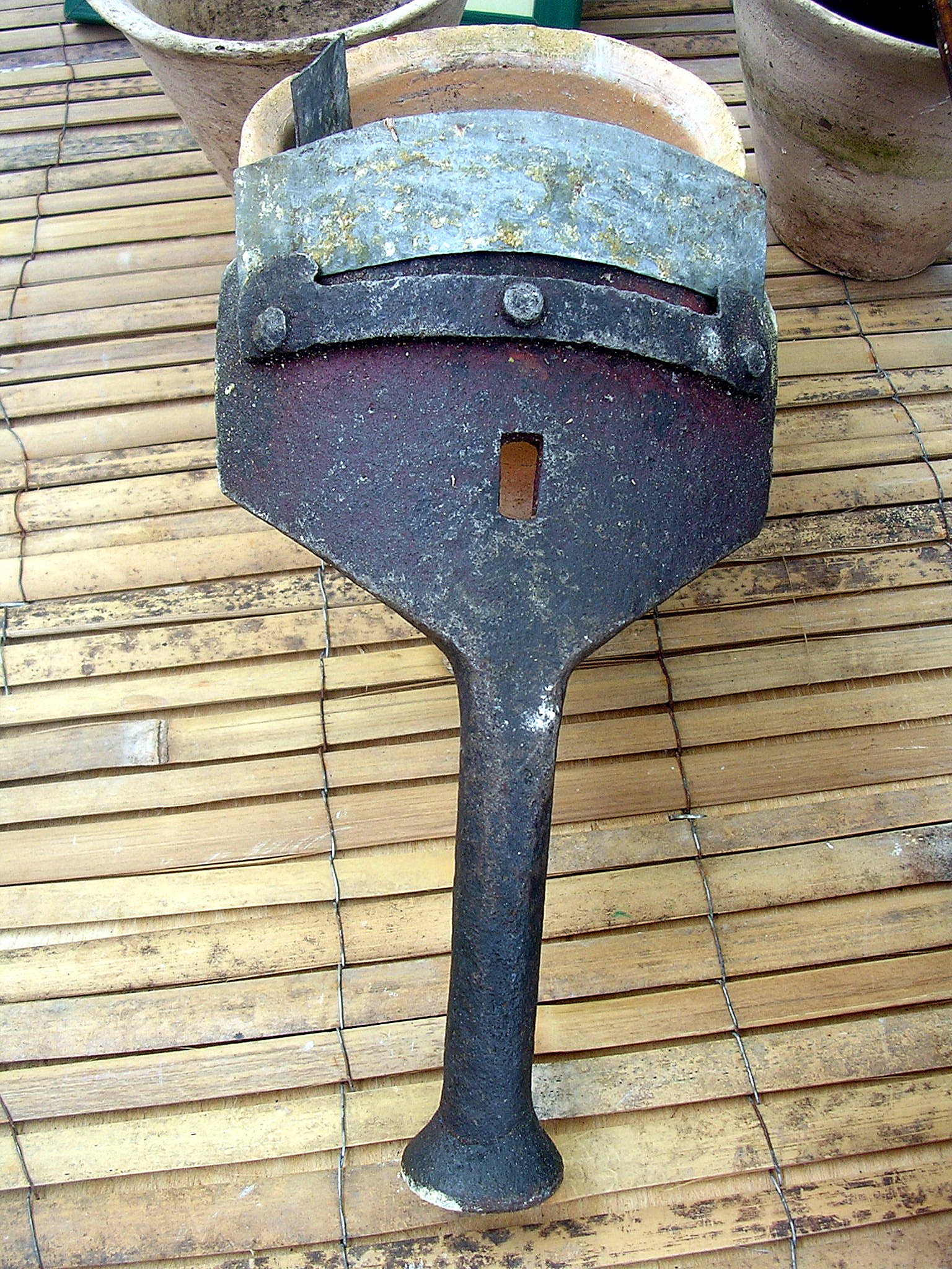 Pousse-crampon, outil de gemmage dans les Landes de Gascogne